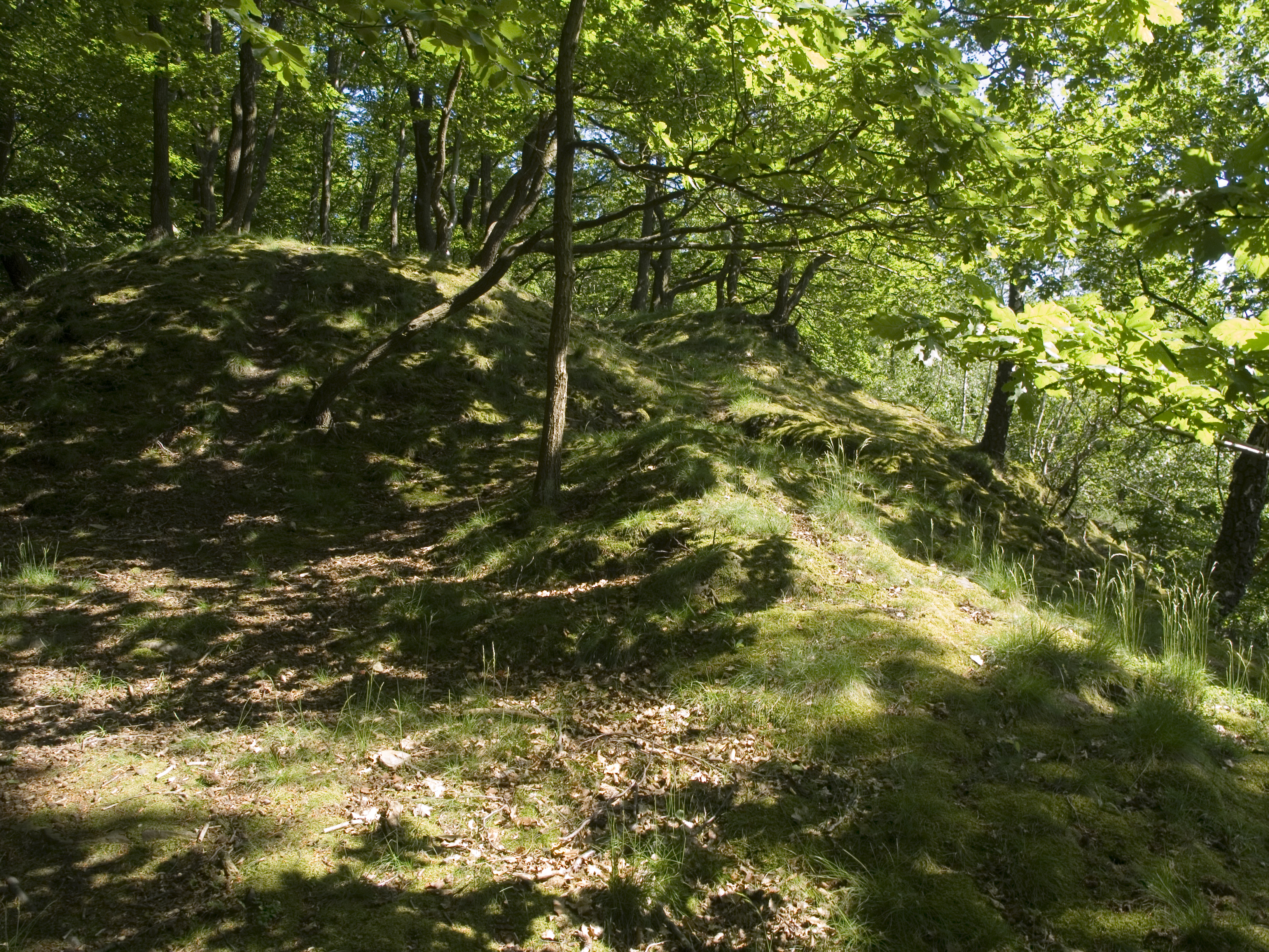 Северный Рейн - Вестфалия, Хаген. Гора Кайсберг